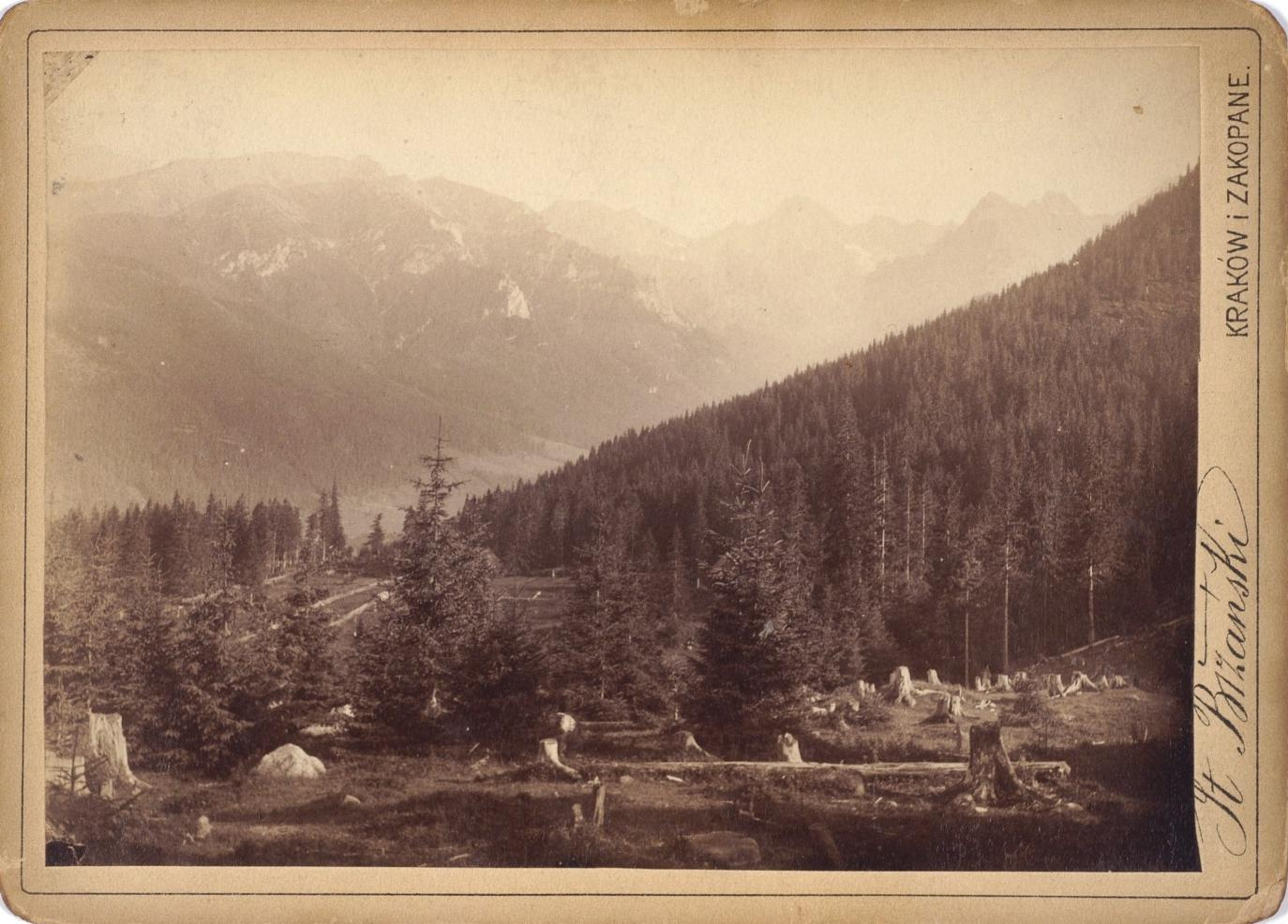 Widok z Wołoszyna na Świstowe Turnie, Polski Grzebień, Gerlach, Żelazne Wrota, Młynarza, Ganek i Wysoką